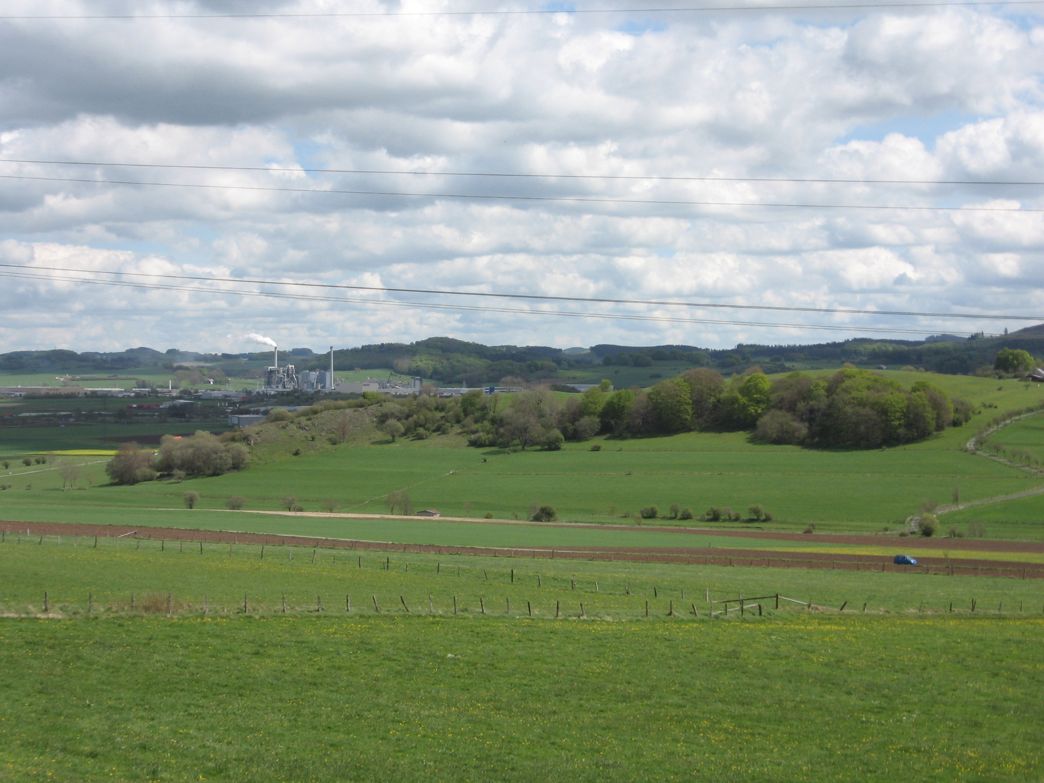 Bereich der Bergkuppe Großer Blumenstein im NSG Blumenstein und das Landschaftsschutzgebiet Grünlandverbund Aa um Bergkuppe.